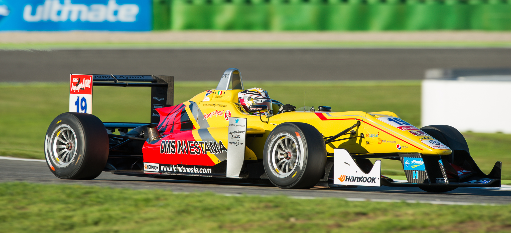 Antonio Giovinazzi,DTM,Dallara F312,Deutsche Tourenwagen Masters,F3 FIA European Championship,FIA Formel 3 Europameisterschaft,Hockenheimring,Jagonya Ayam with Carlin,Motorsport,Volkswagen